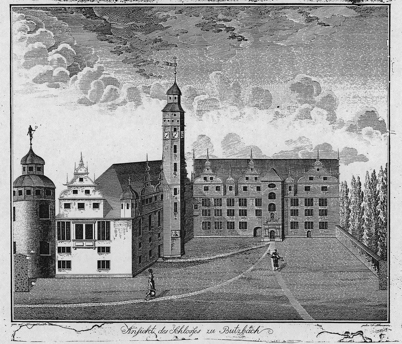 C. Krumbhaar (Zeichner); F. Lehmann (Kupferstecher): Ansicht des Butzbacher Schlosses (1812)